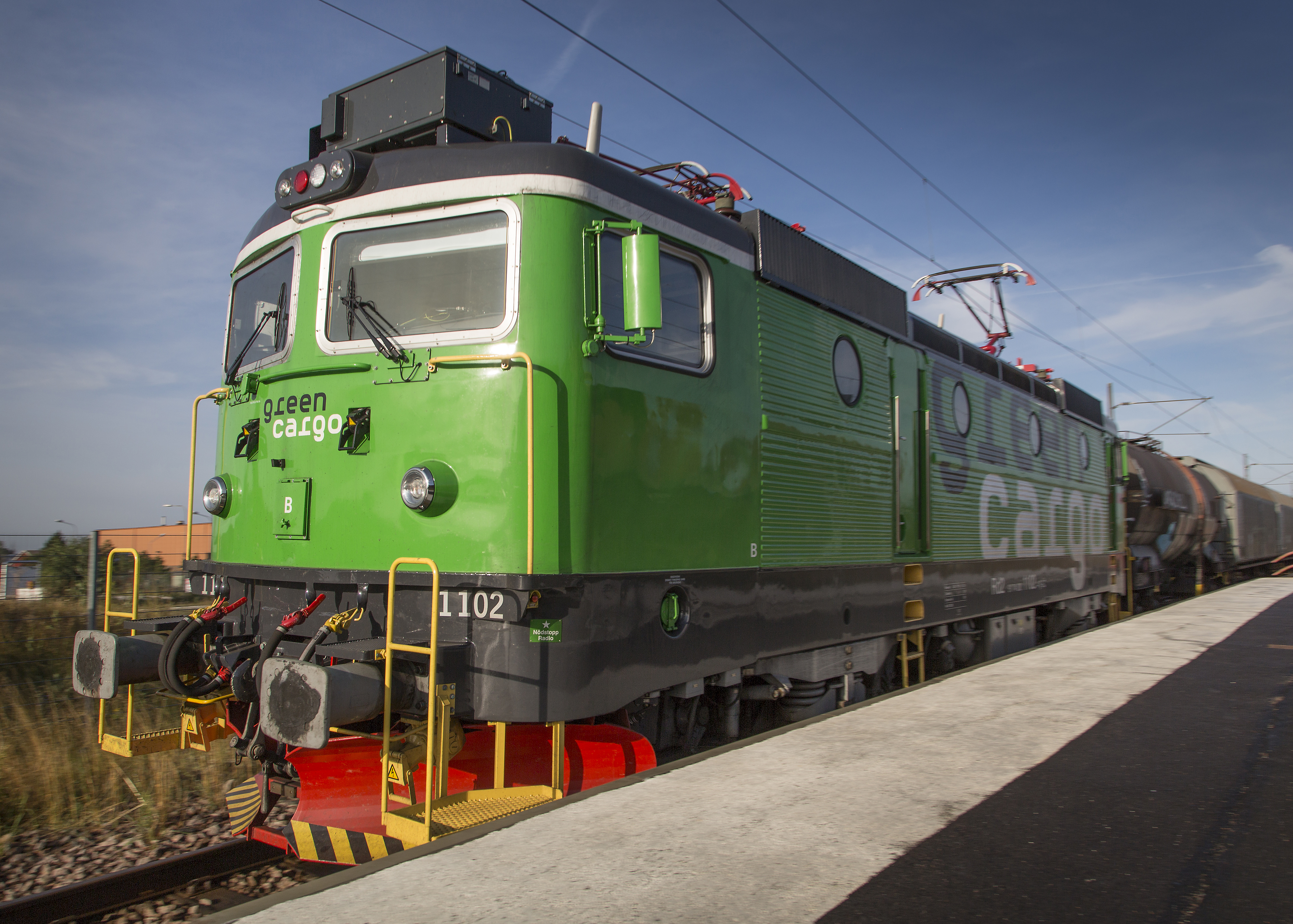 Godståg (freight train) från Green Cargo, Svedala station, Skåne (Scania), Sverige (Sweden). Photo: News Øresund - Jenny Andersson © News Øresund Detta verk av News Øresund är licensierat under en Creative Commons Erkännande 3.0 Unported-licens (CC BY 3.0). Bilden får fritt publiceras under förutsättning att källa anges (Foto: News Øresund - Johan Wessman). The picture can be used freely under the prerequisite that the source is given (Photo: News Øresund - Jenny Andersson). News Øresund, Malmö, Sweden. . News Øresund är en oberoende regional nyhetsbyrå som ingår i projektet Øresund Media Platform som drivs av Øresundsinstituttet i partnerskap med Lunds universitet och Roskilde Universitet och med delfinansiering från EU (Interreg IV A Öresund) och 14 regionala; icke kommersiella aktörer.